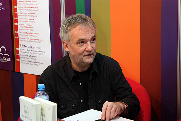 Jerzy Pilch na Targach Książki 2009 w Krakowie.